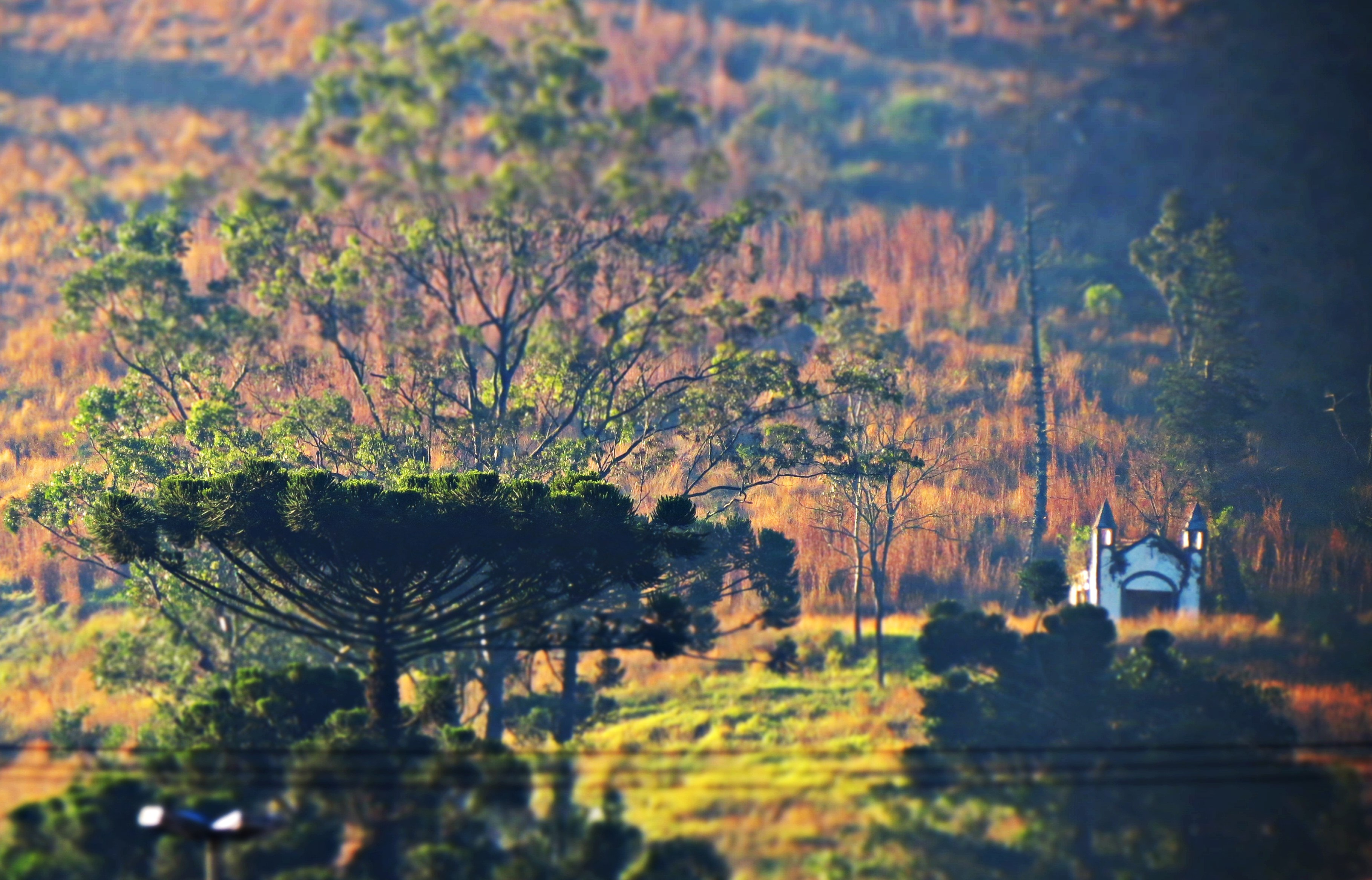 Cenário rural no centro de Mairiporã